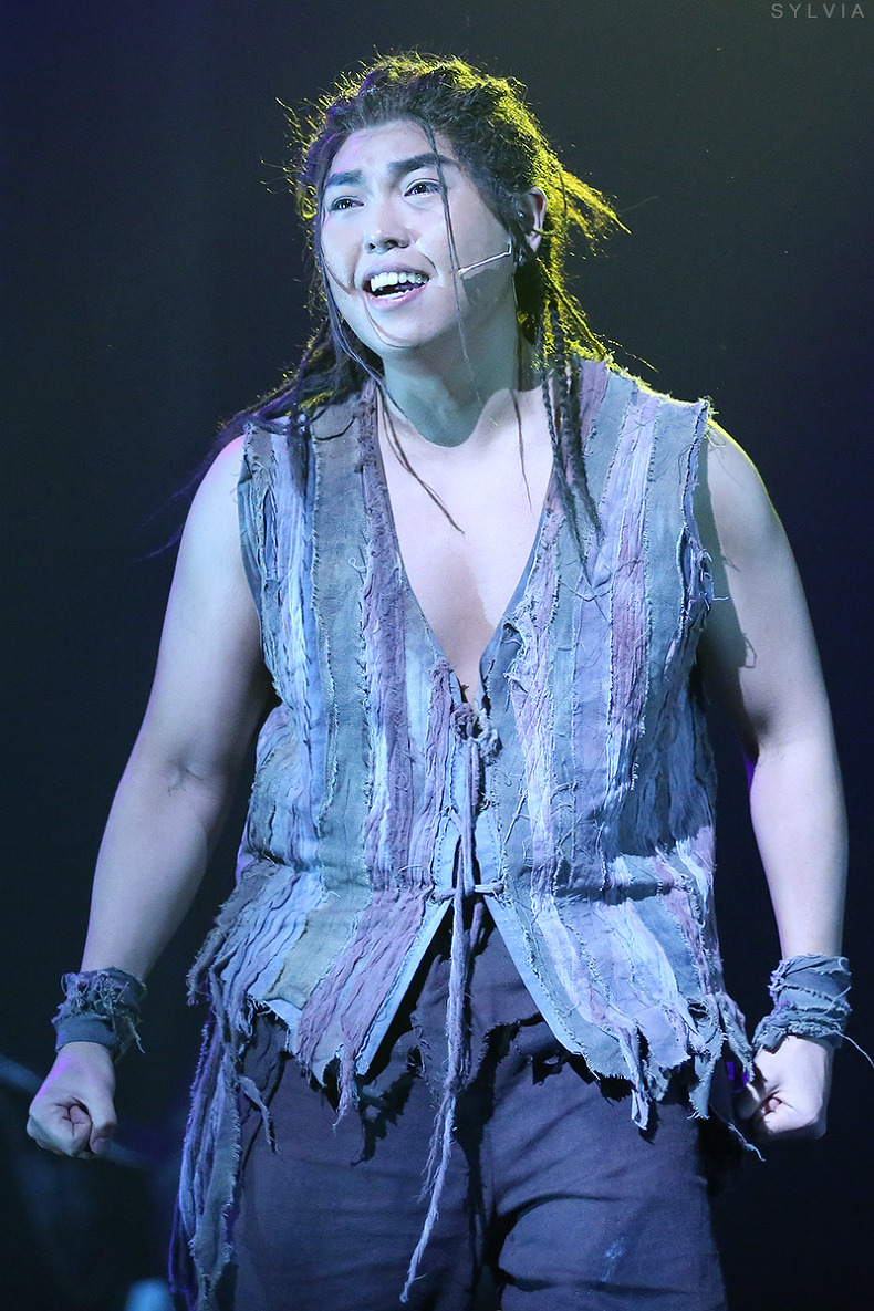 한국어 (조선): 150118 바람과함께사라지다(낮) 커튼콜